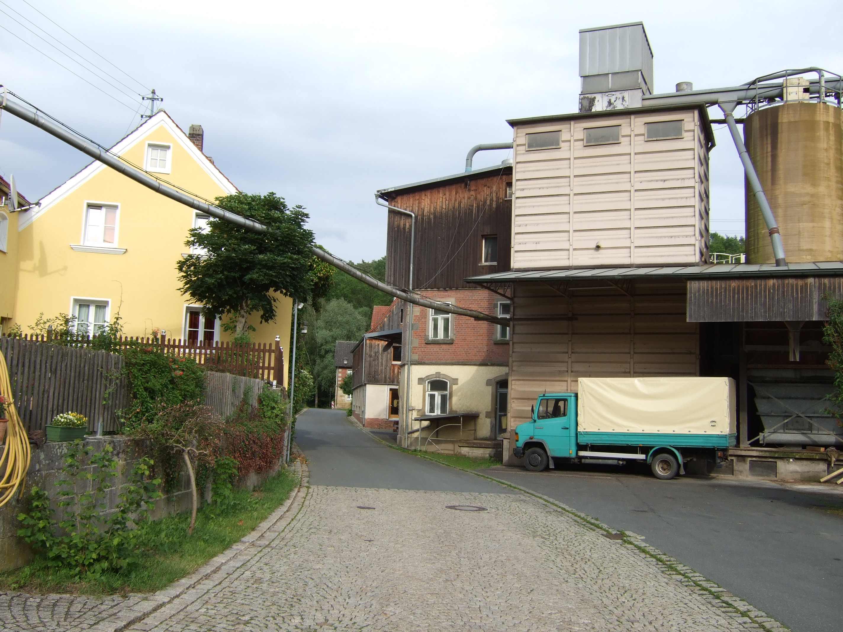 Döhlau bei Bayreuth (rechts die Switalski-Mühle)